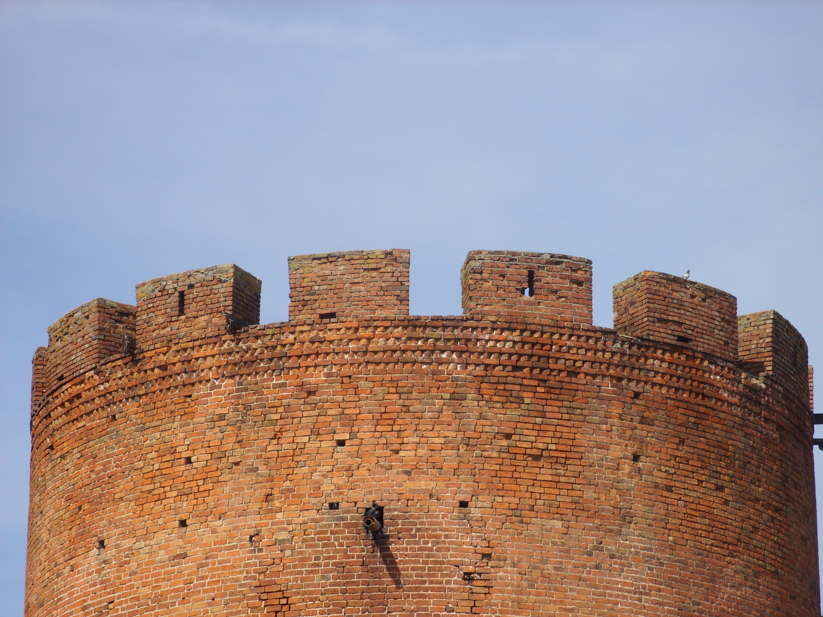 Зубцы на Камянецкай вежы